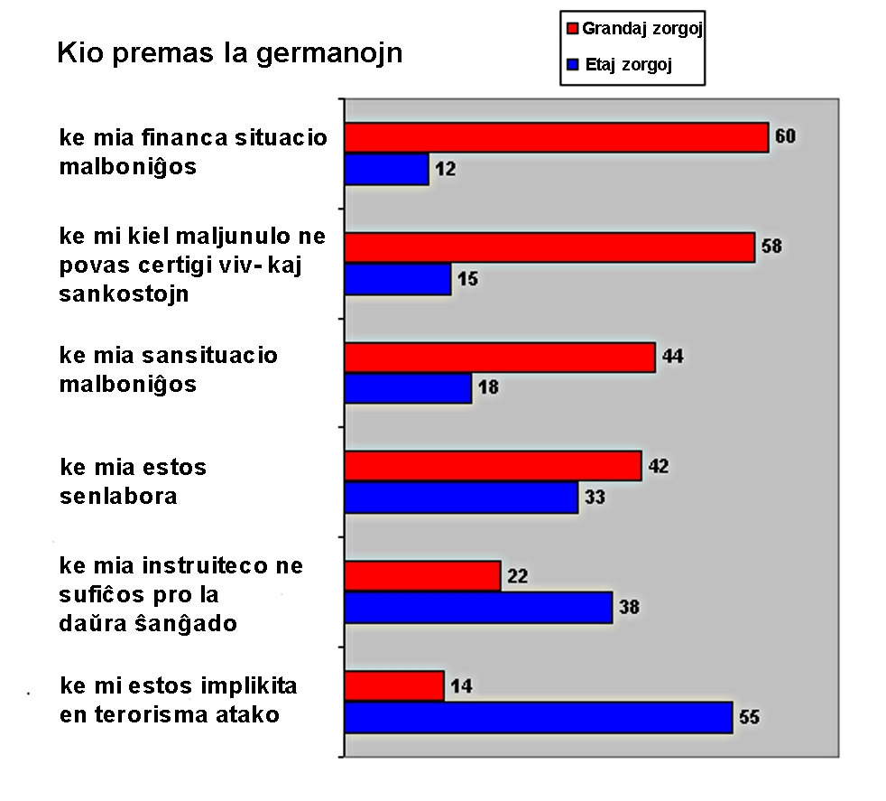 Esperantigita versio de "Sorgen deutschland.png" el la germana vikipedio ( Prilaborita de Punktor 12:47, 27. Sep 2008 (UTC)